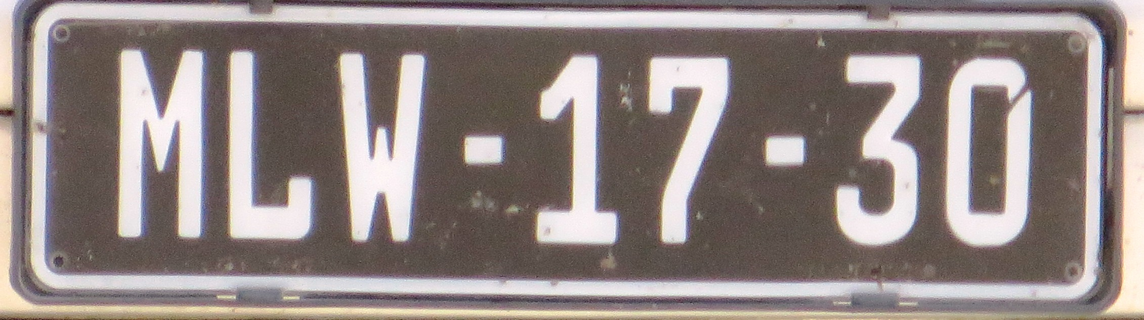 Mozambique kentekenplaat